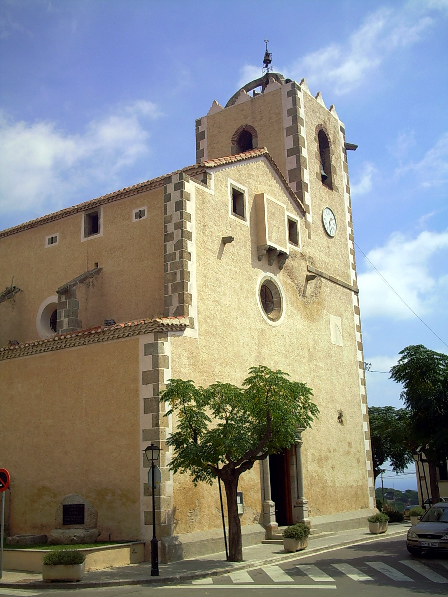 Parròquia de Sant Vicenç de Montalt, al Maresme, (Catalunya), construïda l'any 1591, per Dionís Torres (Calella)